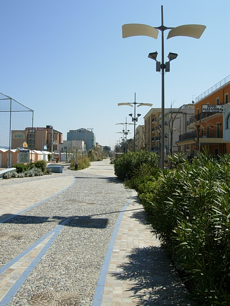 Lungomare verso sud a Misano Adriatico